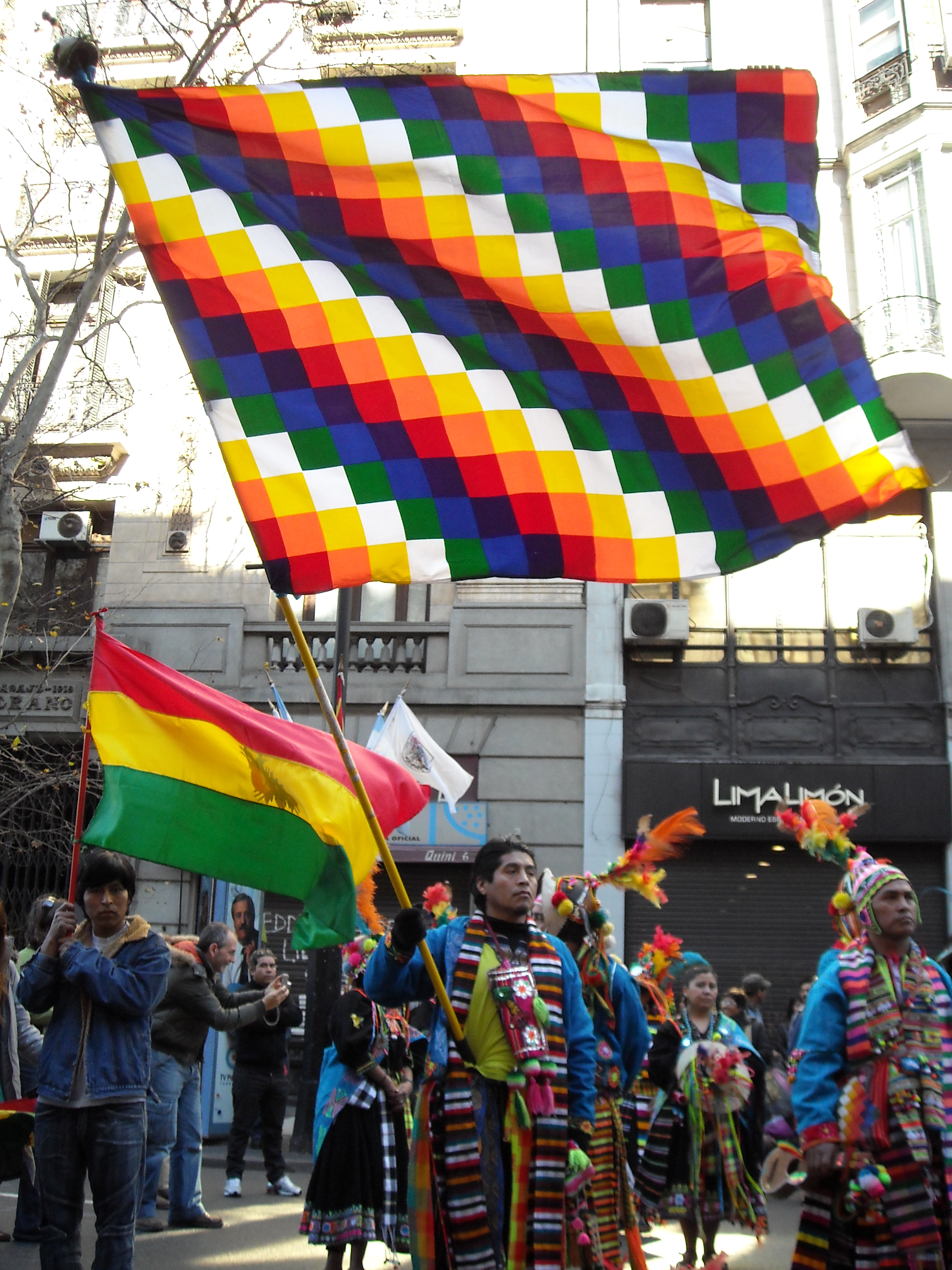 Buenos Aires Celebra Bolivia 2010.